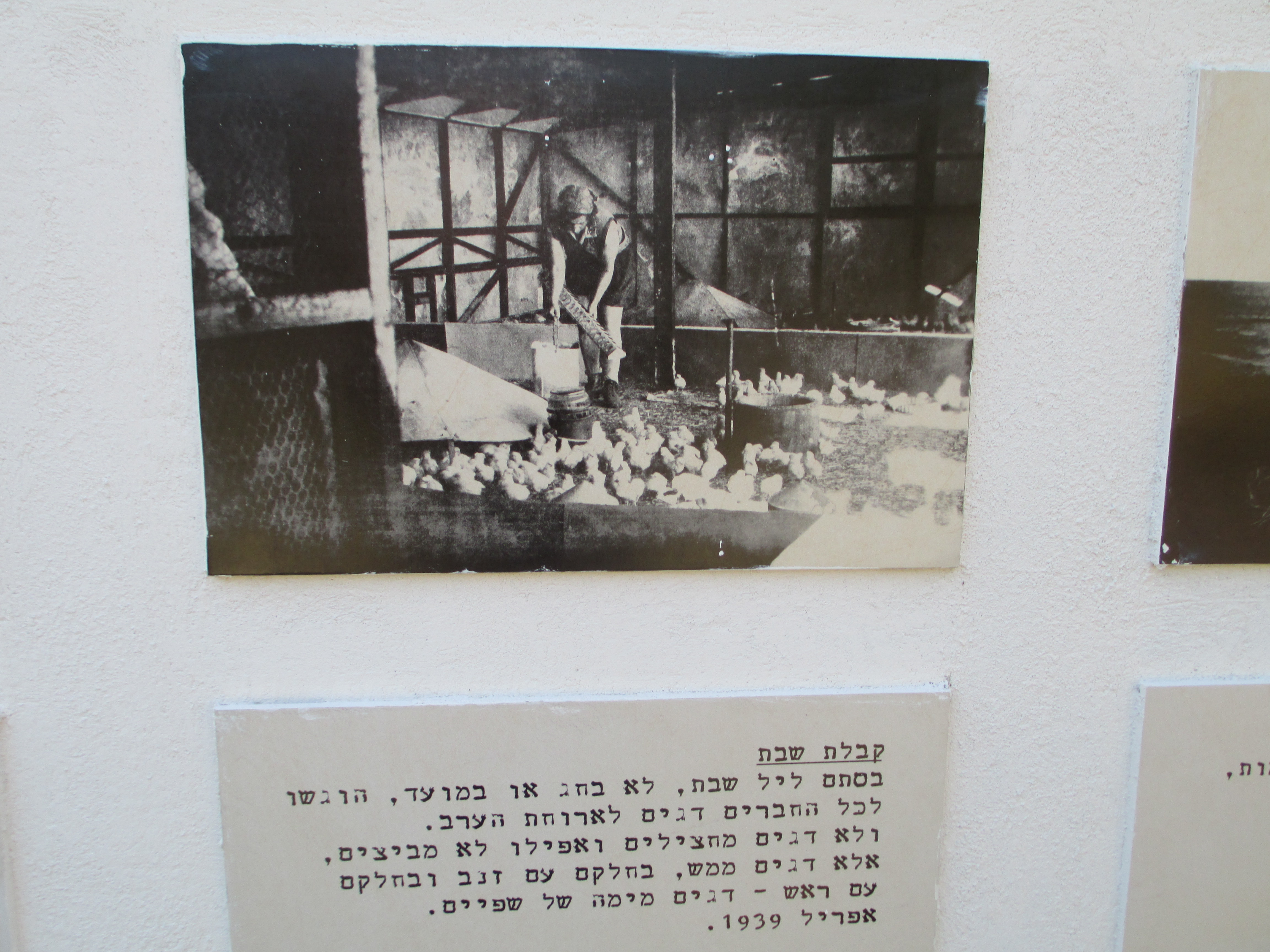 הודעה על סעודת קבלת שבת בשפיים, 1939